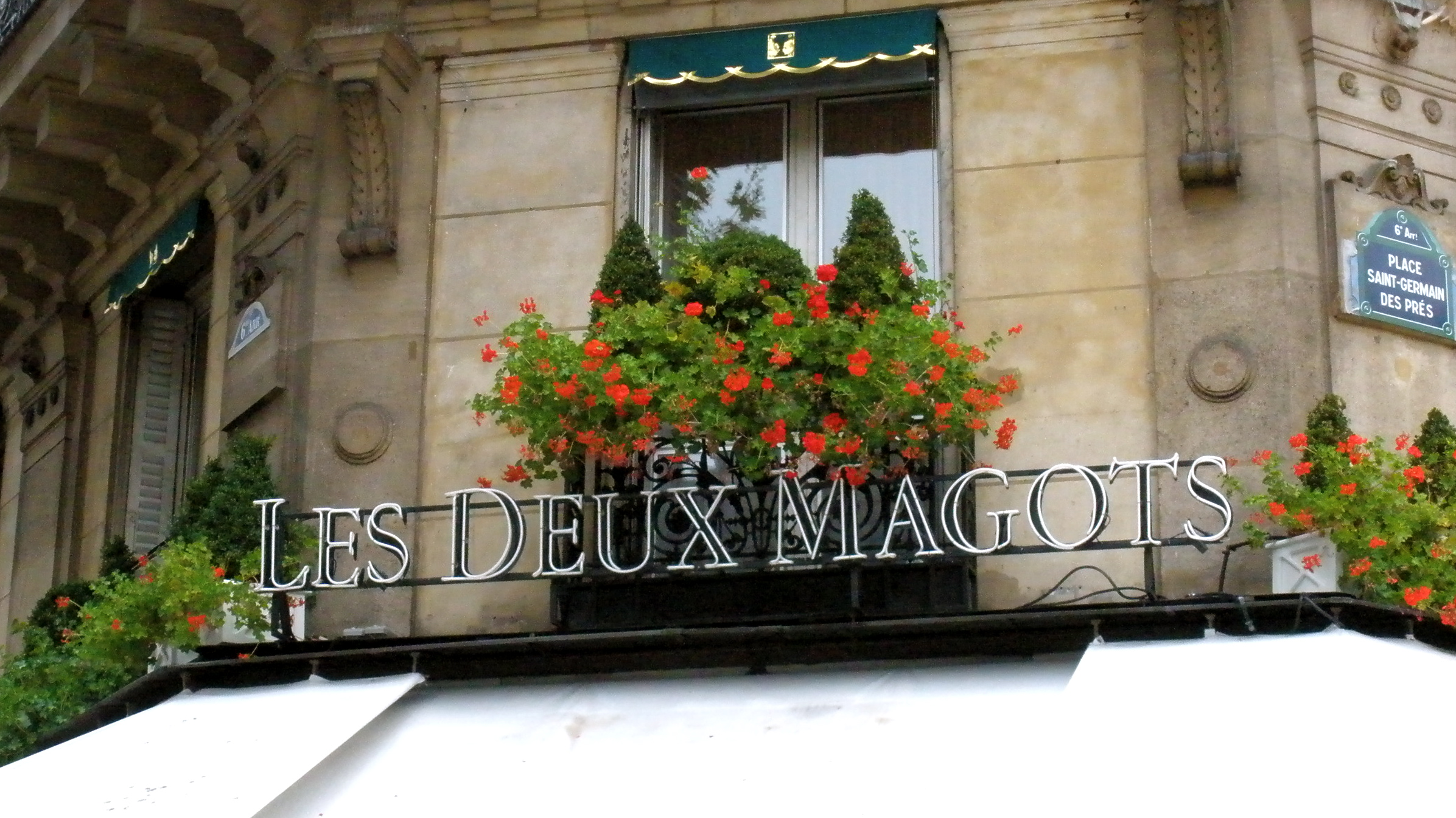 les deux magots cafe, paris, france